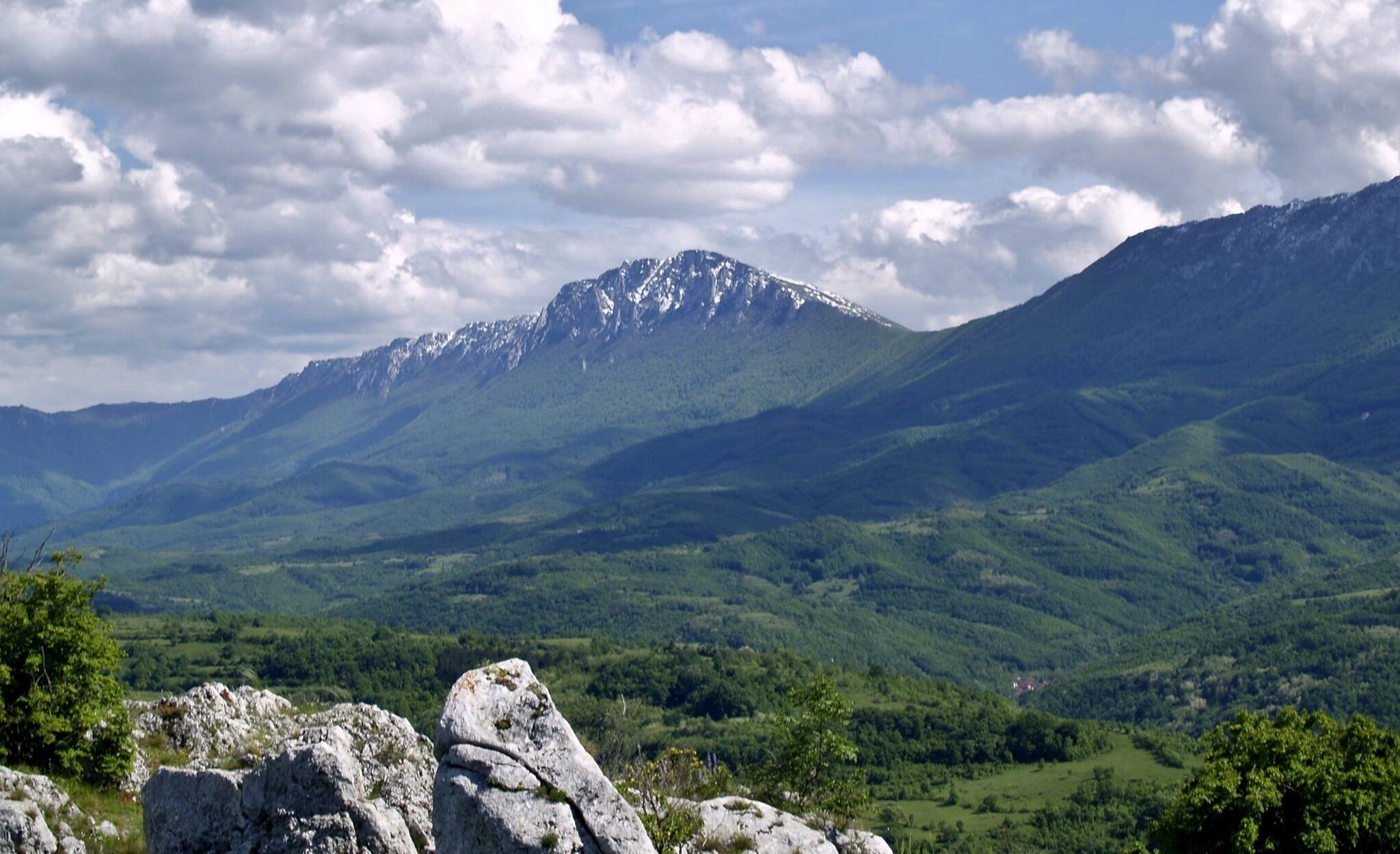 Pogled na Suvu planinu sa najviseg vrha Jelasnicke klisure Radovanskog kamena (580 m). Autor slike : Una Marinkovic, Nis, 12. maj 2014.